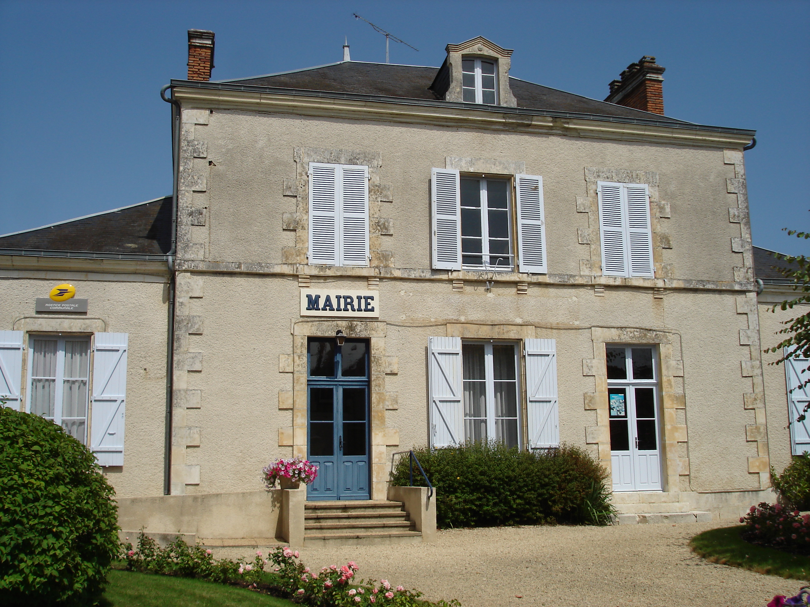 Mérigny (36) : La mairie.